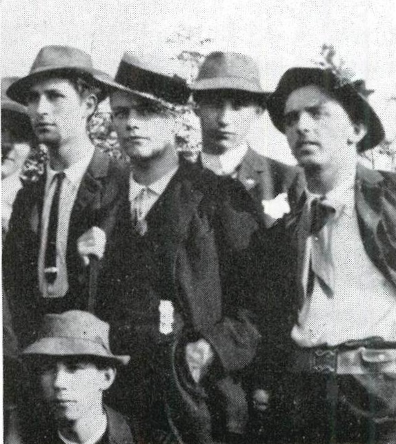 Eduard Gubler (links) und Karl Stamm (2. v. links), ca. 1908